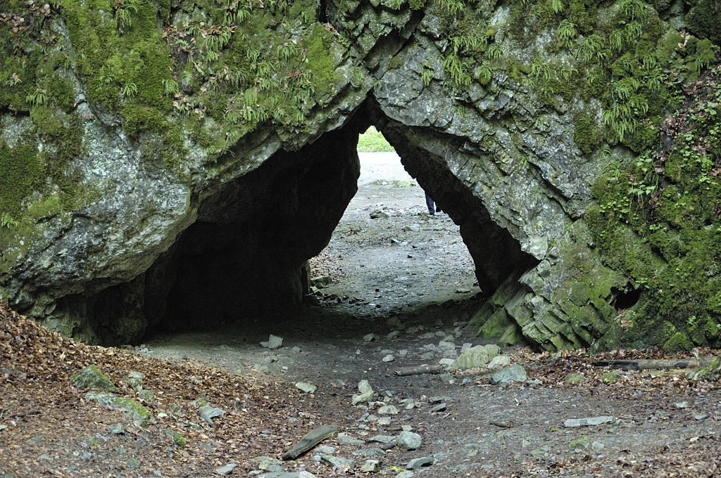 Čertova branka (Čertova vrátka)